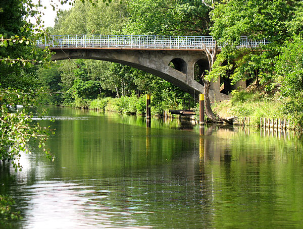 Letzte der Originalbrücken über den Stichkanal